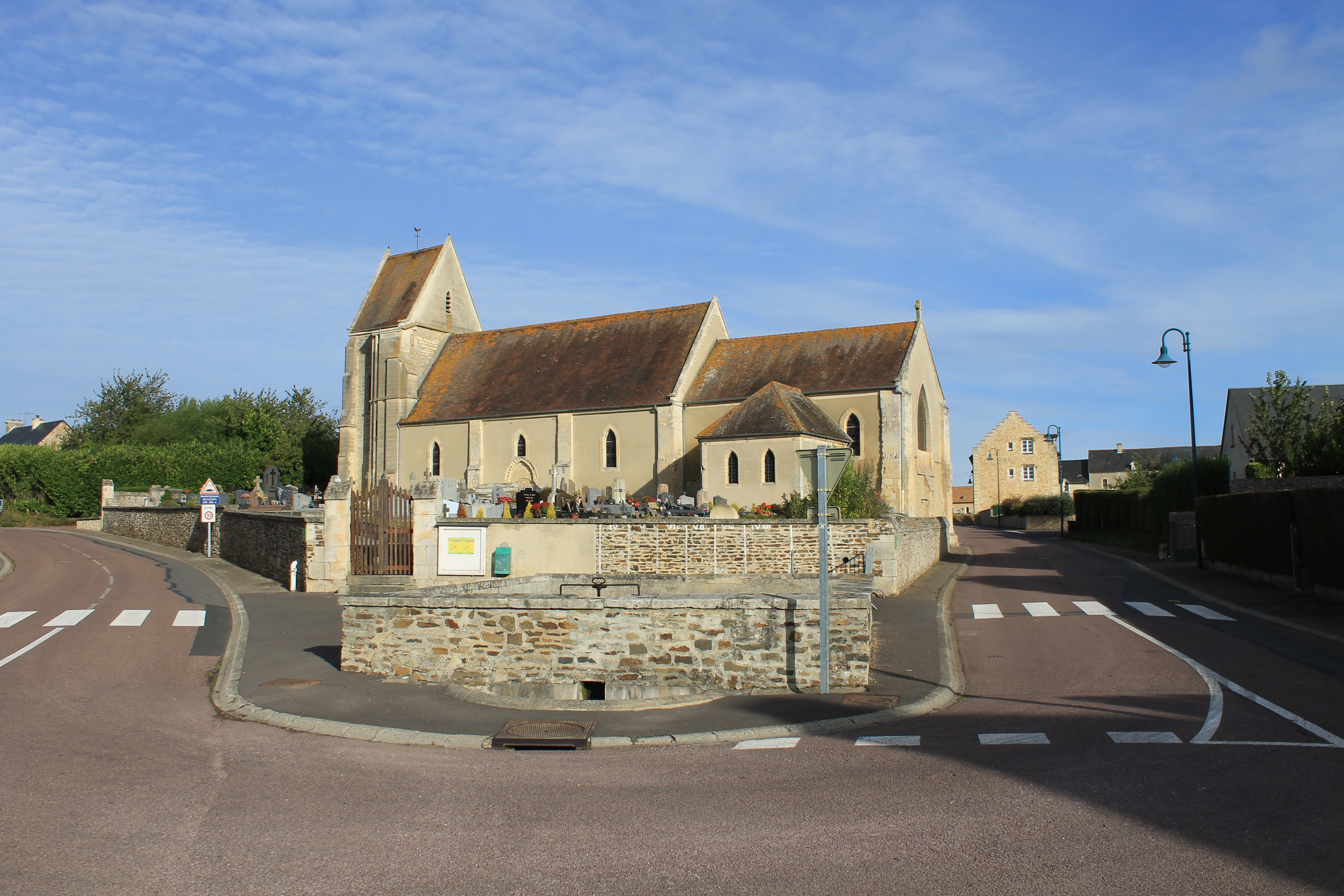 L'église Saint-Denis et le lavoir public de Mondrainville (Calvados)